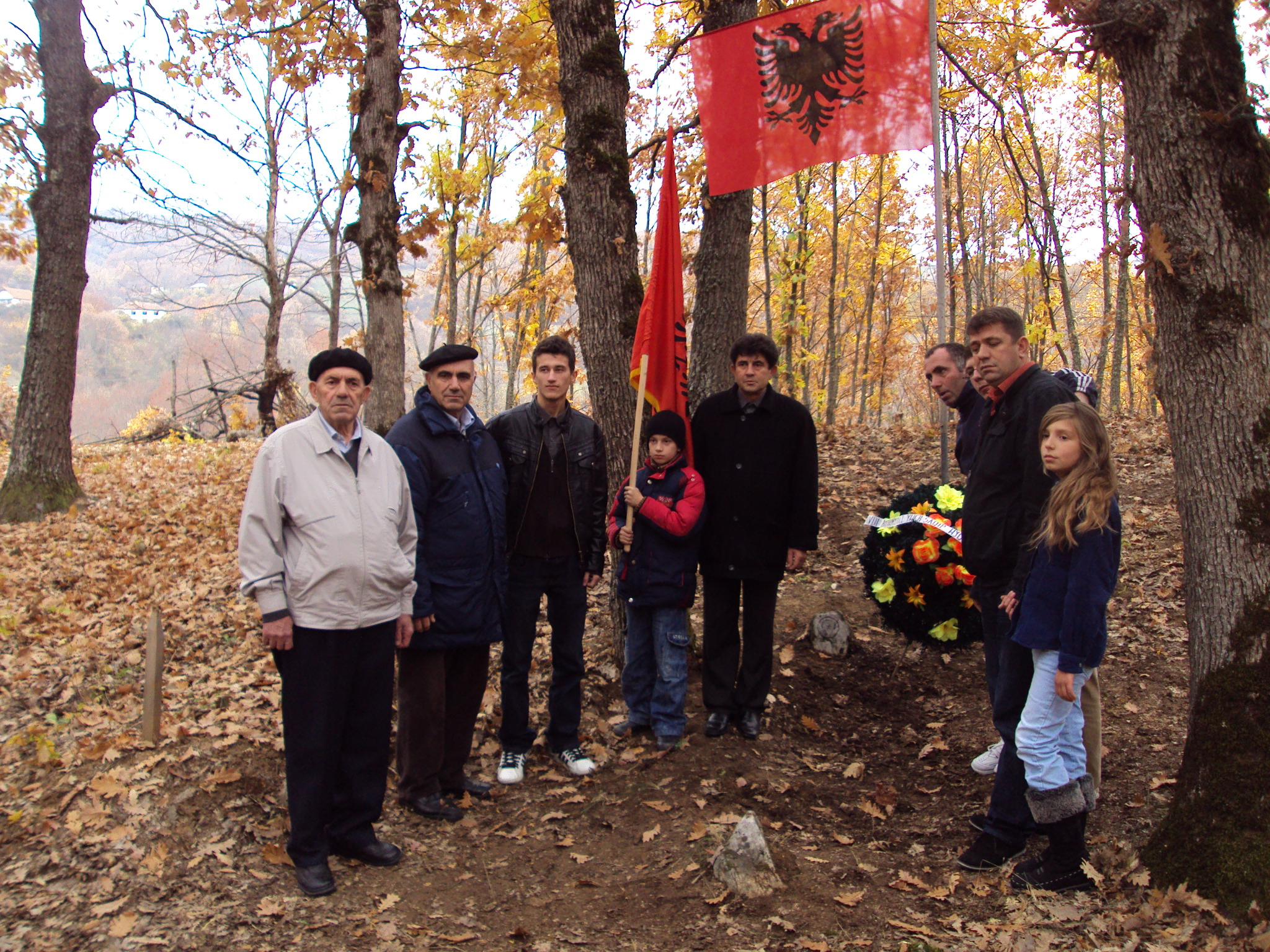 Pran varrit të Imer Myqybabajt në Kokaj , homazh nga familjarët me rasti e 100 vjetorit të Pavarësisë së Shqipërisë